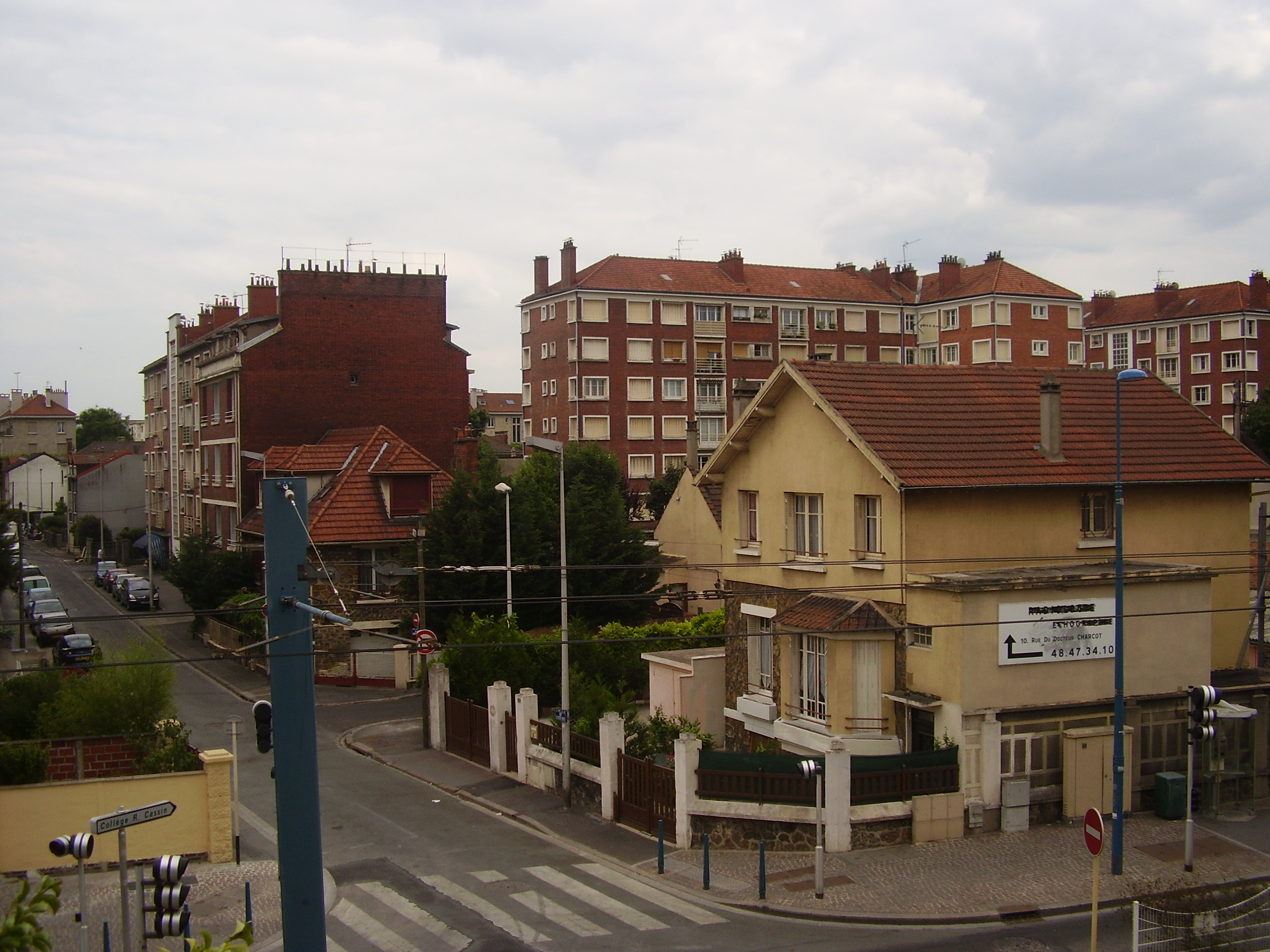 Quartier du petit Noisy